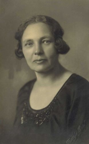 Minka Govekar (1874-1950), Slovene writer and translator.